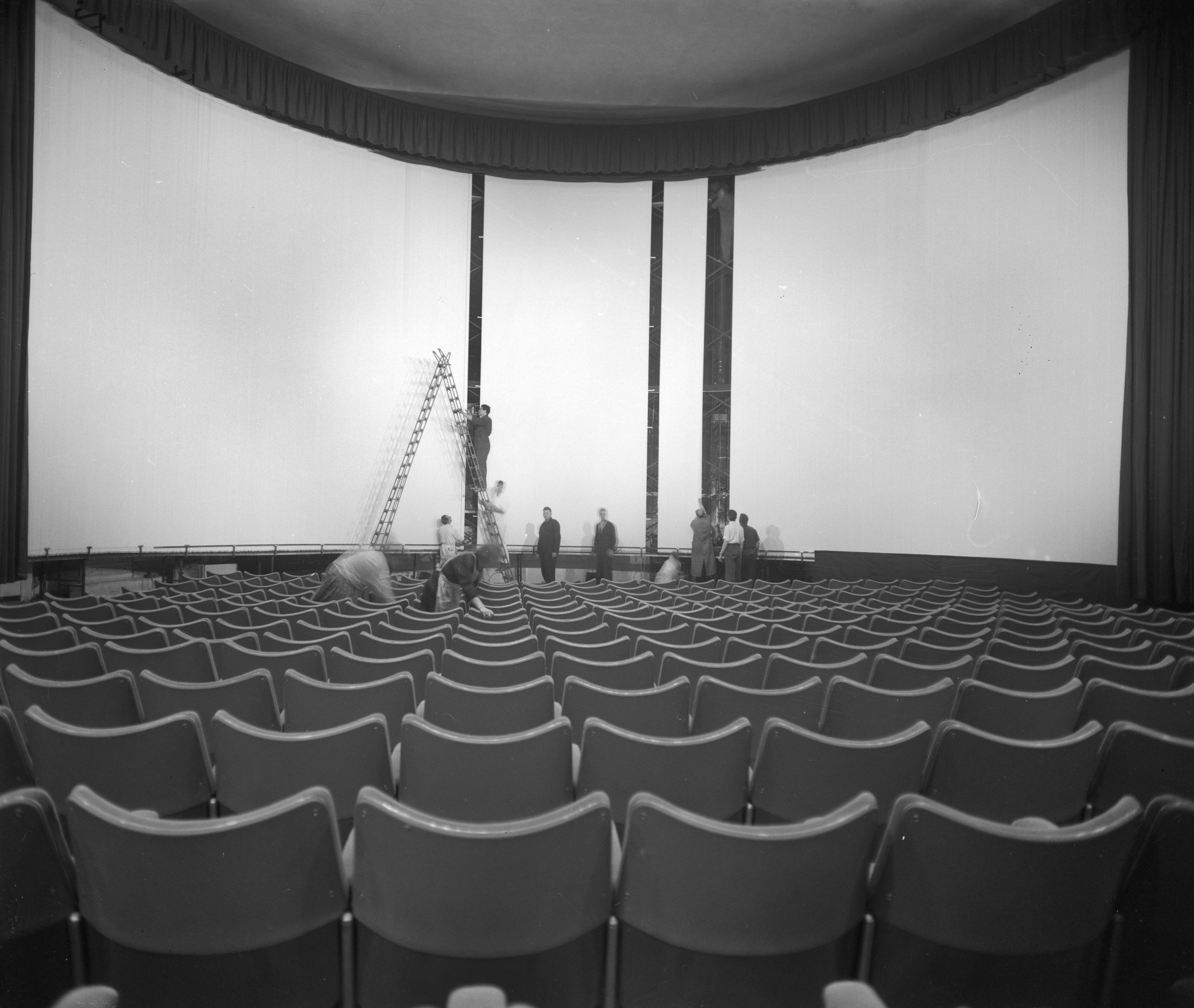 Collectie / Archief : Fotocollectie Anefo Reportage / Serie : [ onbekend ] Beschrijving : Het Nederlandse Cinerama theater te Rotterdam Datum : 6 juli 1960 Locatie : Rotterdam, Zuid-Holland Trefwoorden : bioscopen, cinematografie, theaters Persoonsnaam : Cinerama Fotograaf : Behrens, Herbert / Anefo Auteursrechthebbende : Nationaal Archief Materiaalsoort : Negatief (zwart/wit) Nummer archiefinventaris : bekijk toegang 2.24.01.04 Bestanddeelnummer : 911-4025